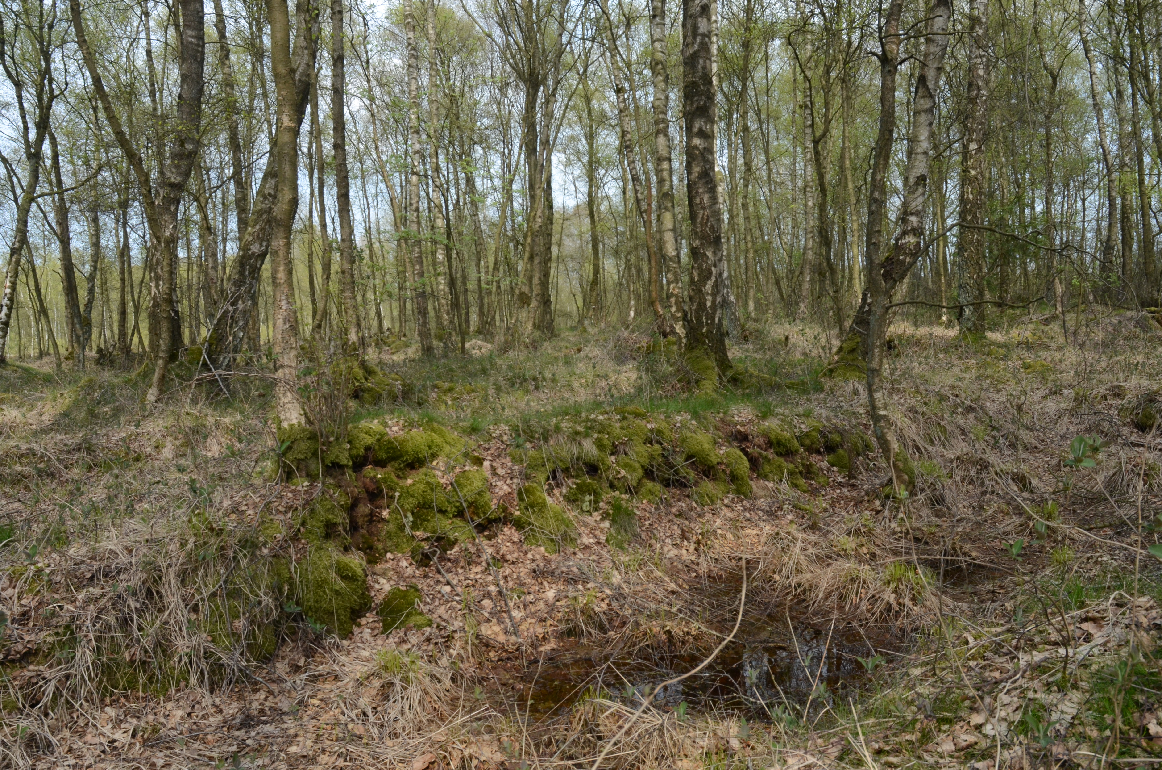 Birkenmoorwald im Tarbeker Moor